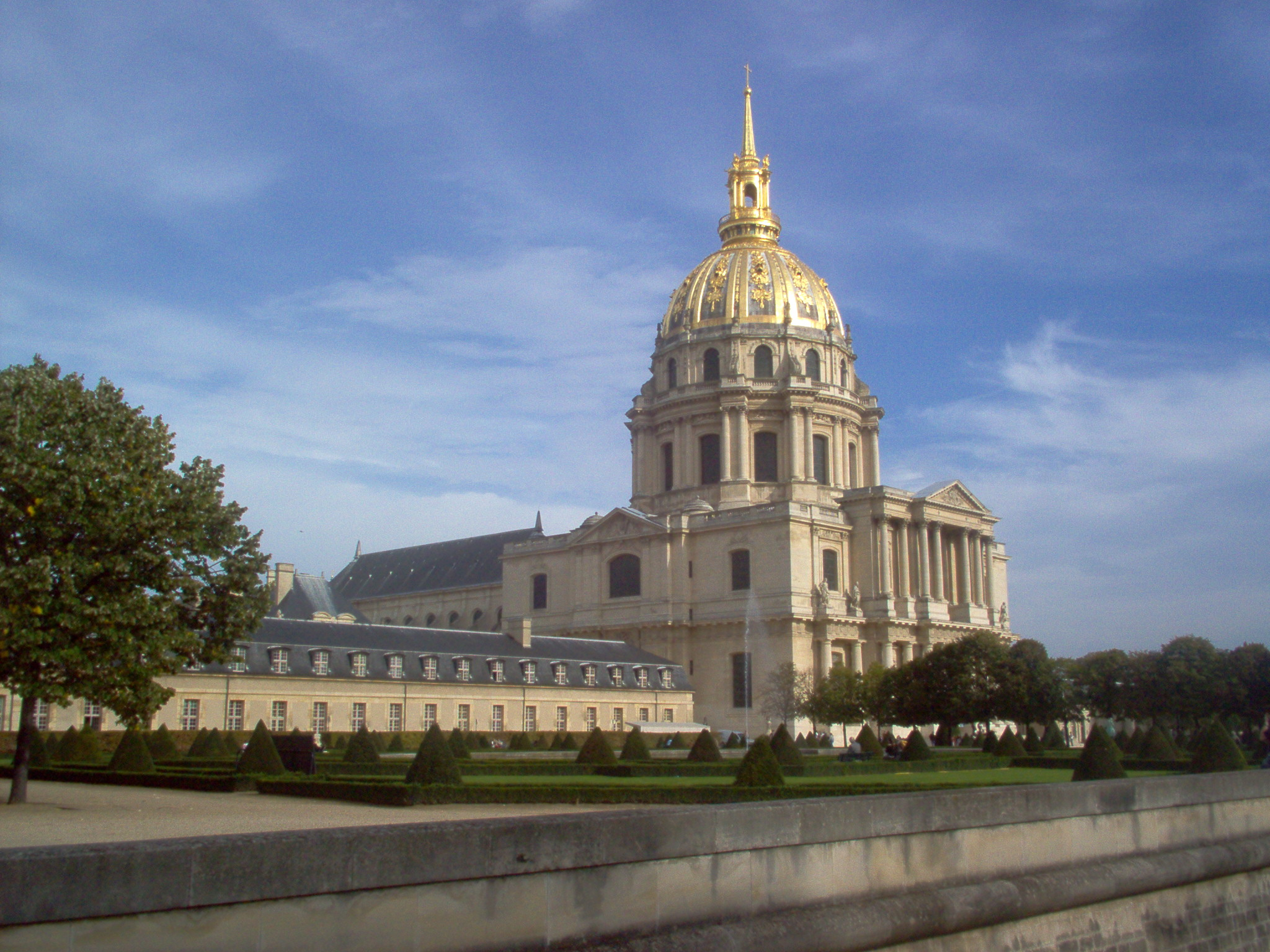 Jardin de l'Intendant avec à gauche bâtiments de l'Institution nationale des Invalides et au fond façades du Dôme des Invalides, vu depuis les douves secs de l'Hôtel des Invalides, Avenue de Tourville, VIIe arrondissement, Paris, France